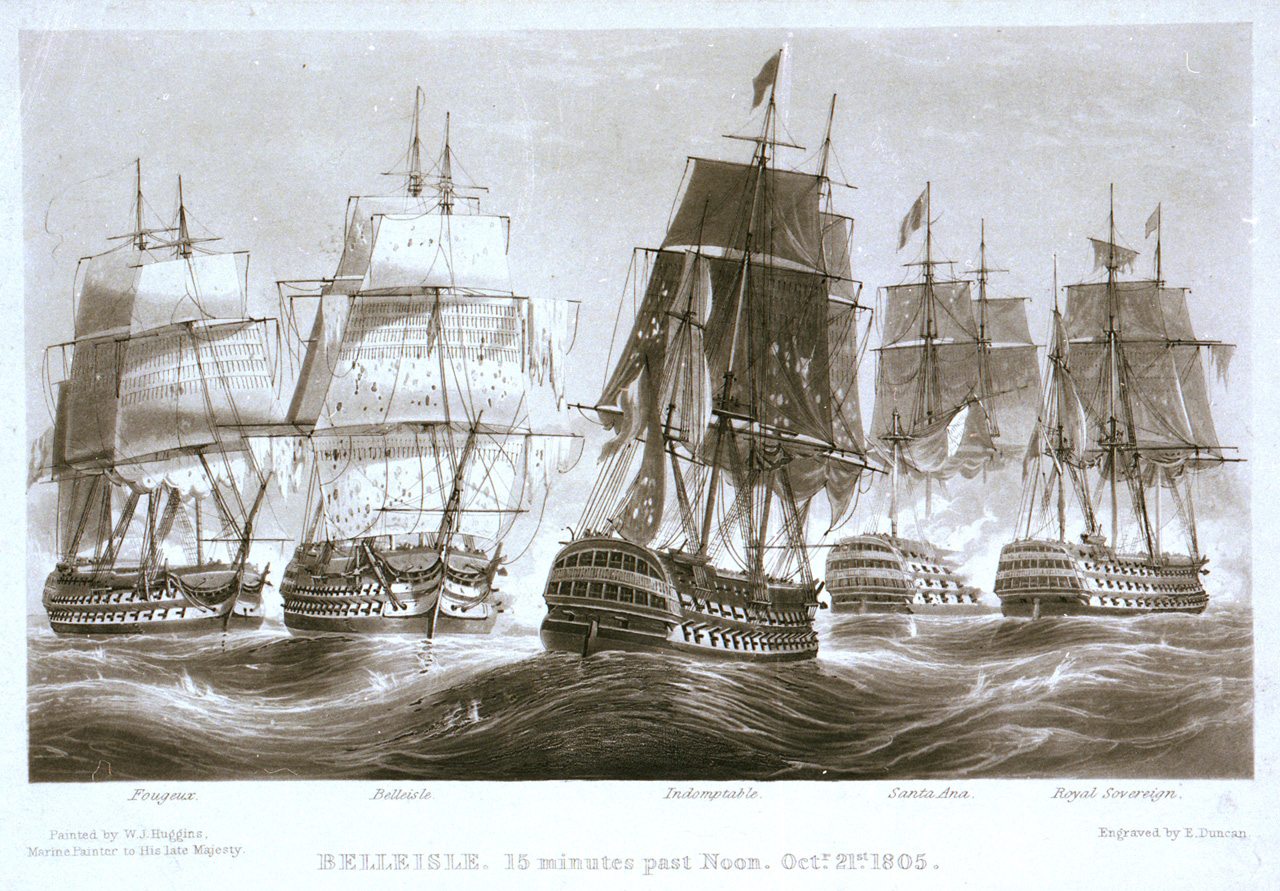 Belleisle, 15 minutes past noon